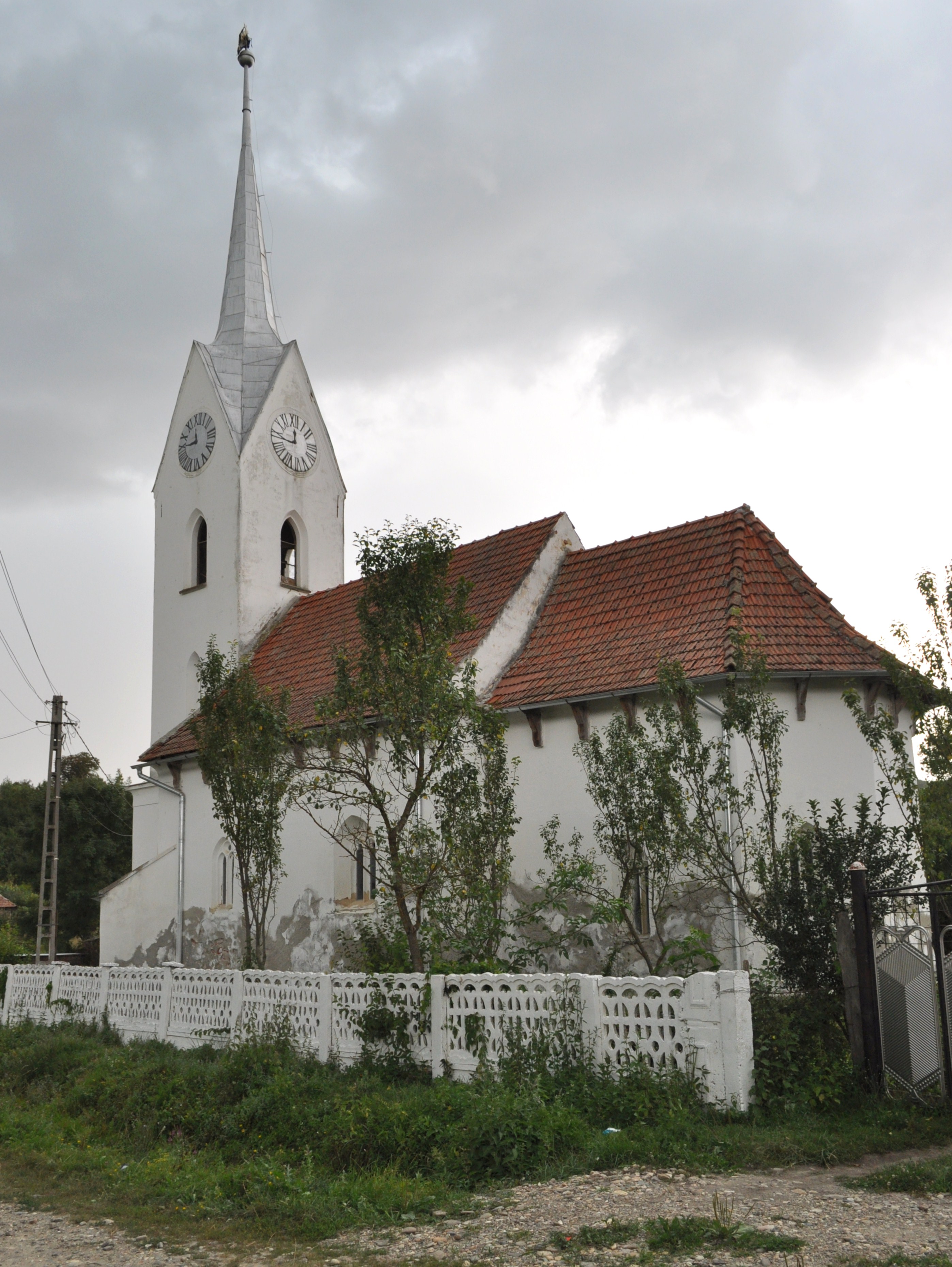 Biserica reformată din Năsal, județul Cluj